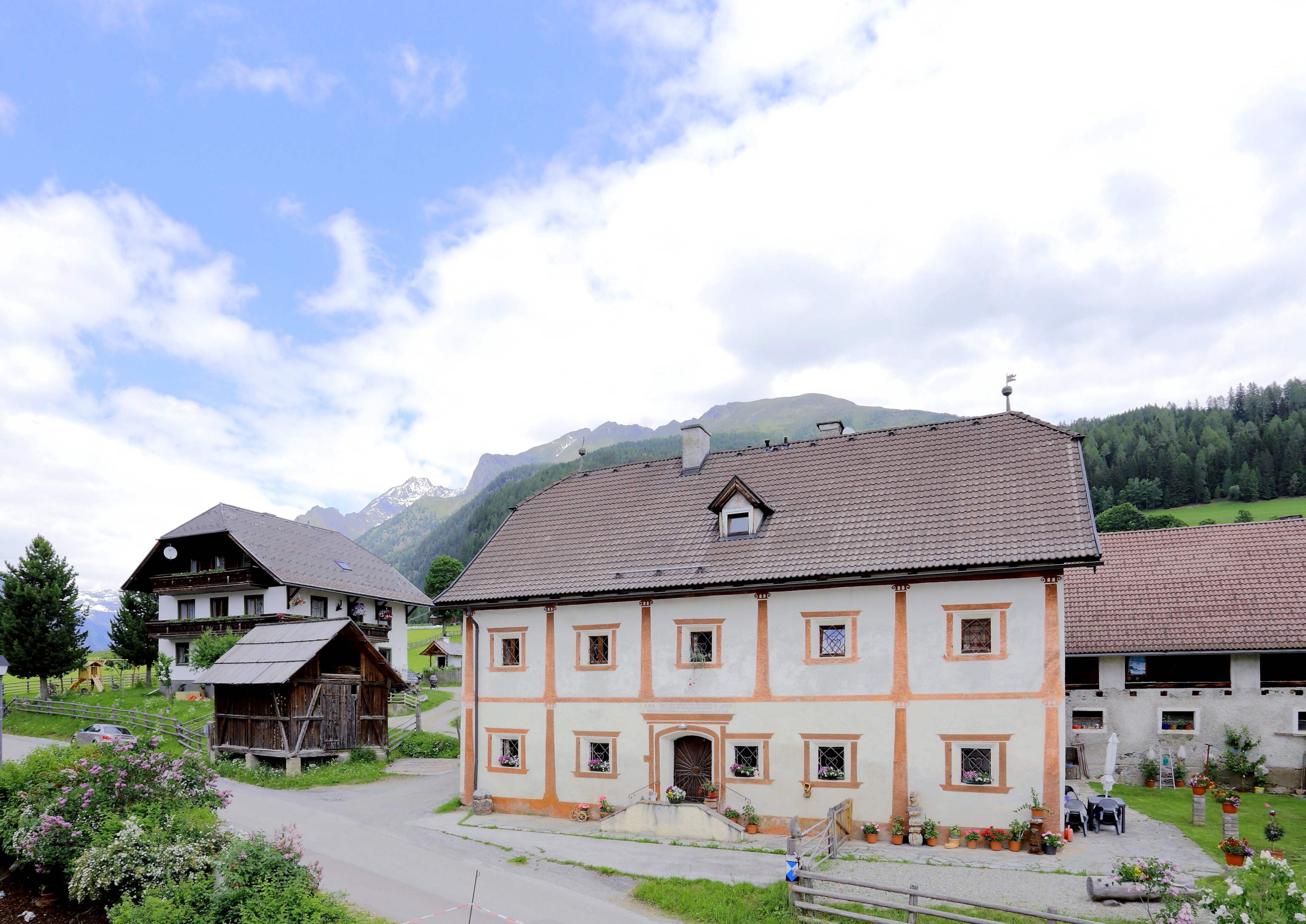 Piendlhof in der Salzburger Gemeinde Göriach.